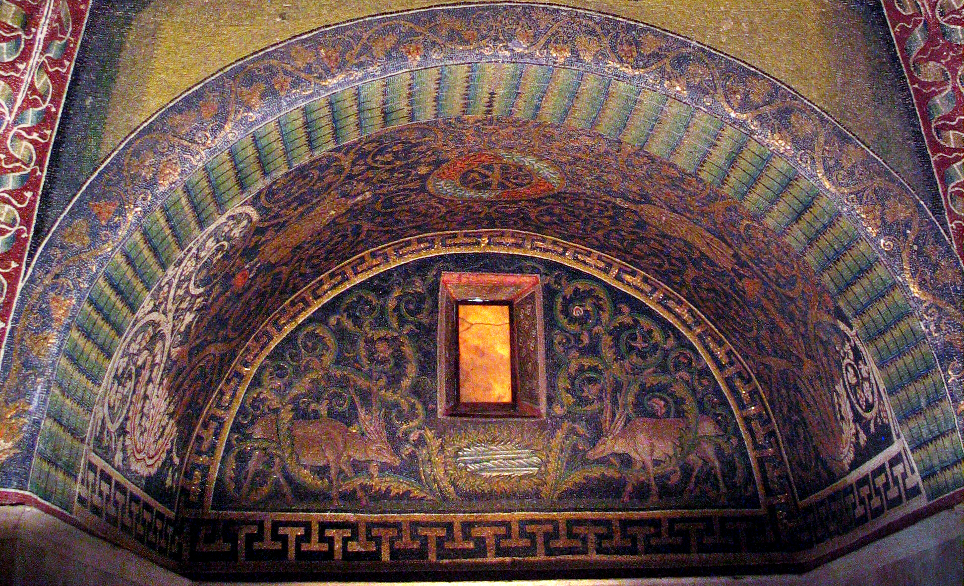 Mausoleum der Galla Placidia in Ravenna, Italien. Mosaik rechter Hand beim Betreten